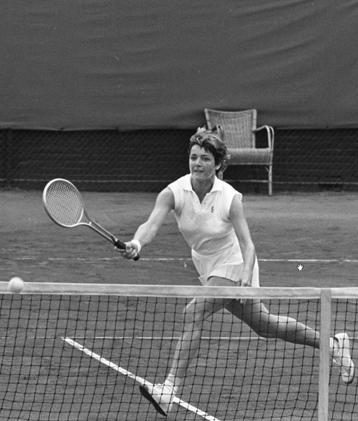 Internationale tenniskampioenschappen in Hilversum ( t Melkhuisje ); Margaret Court in aktie